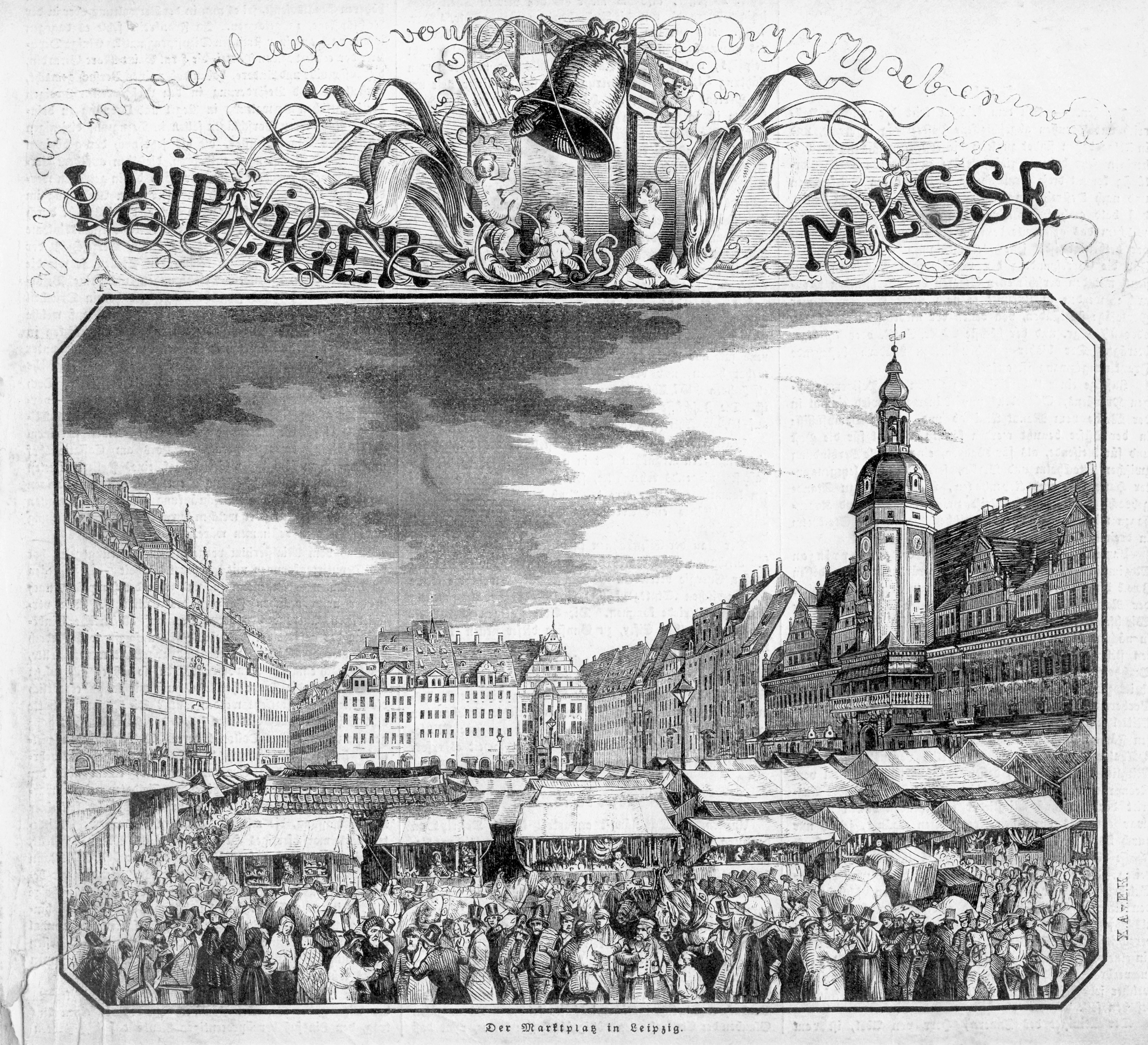 Leipziger Messe 1844